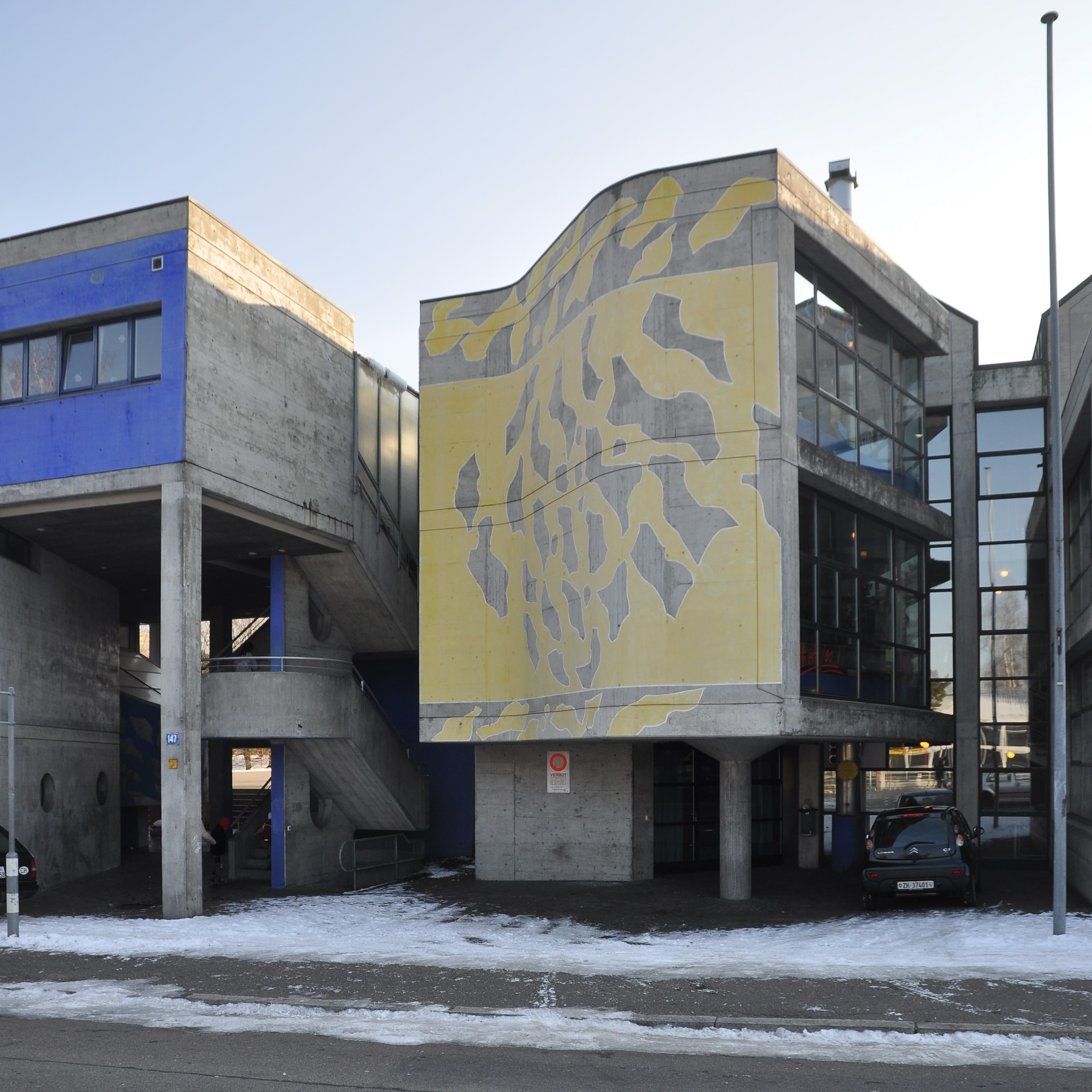 Loogarten, Primarschule und Freizeitanlage, Zürich, 1974-75, Architekt: Naef, Studer und Studer, Fassadenbemalung